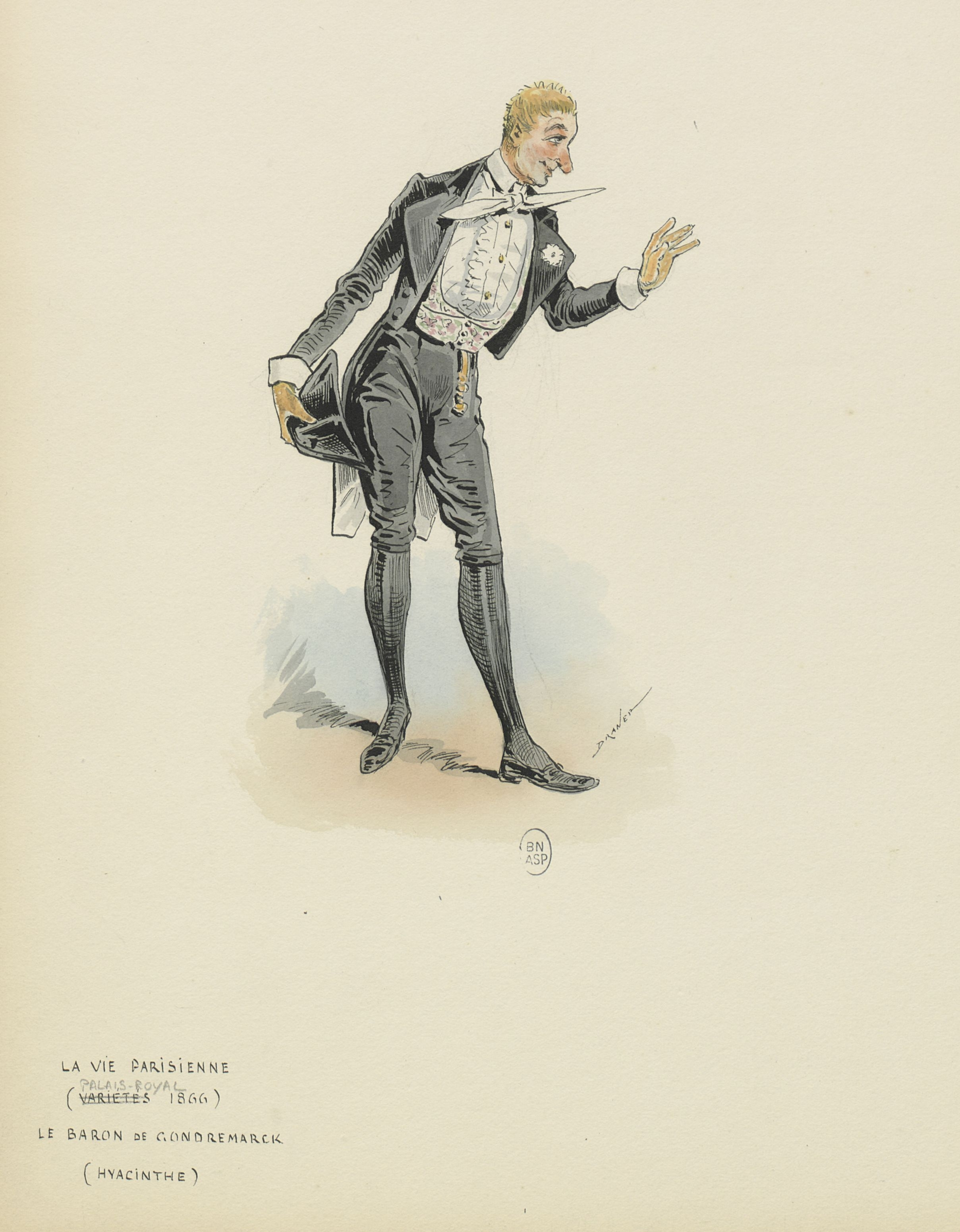 La vie parisienne, opéra-bouffe de Meilhac, Halévy et Offenbach : portraits des acteurs en costumes par Draner